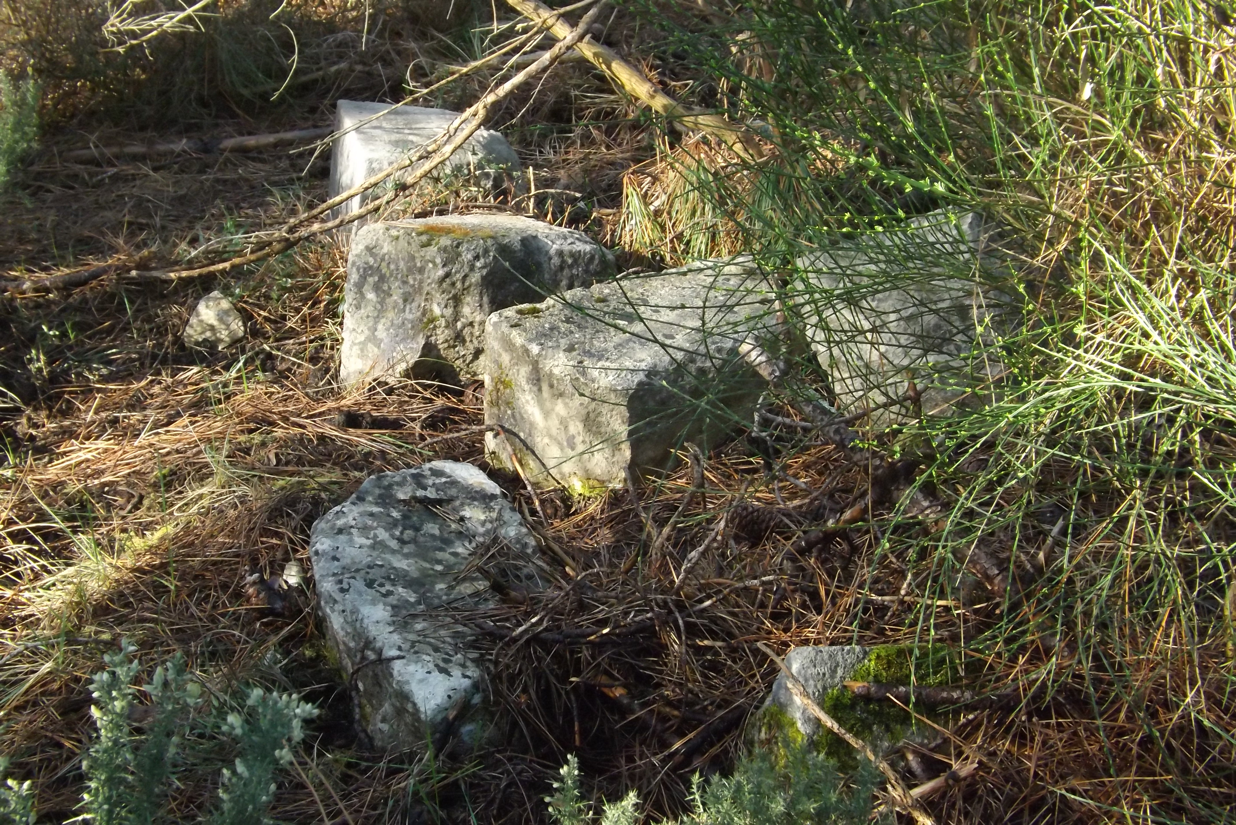 Ruine de la Chapelle de Buze